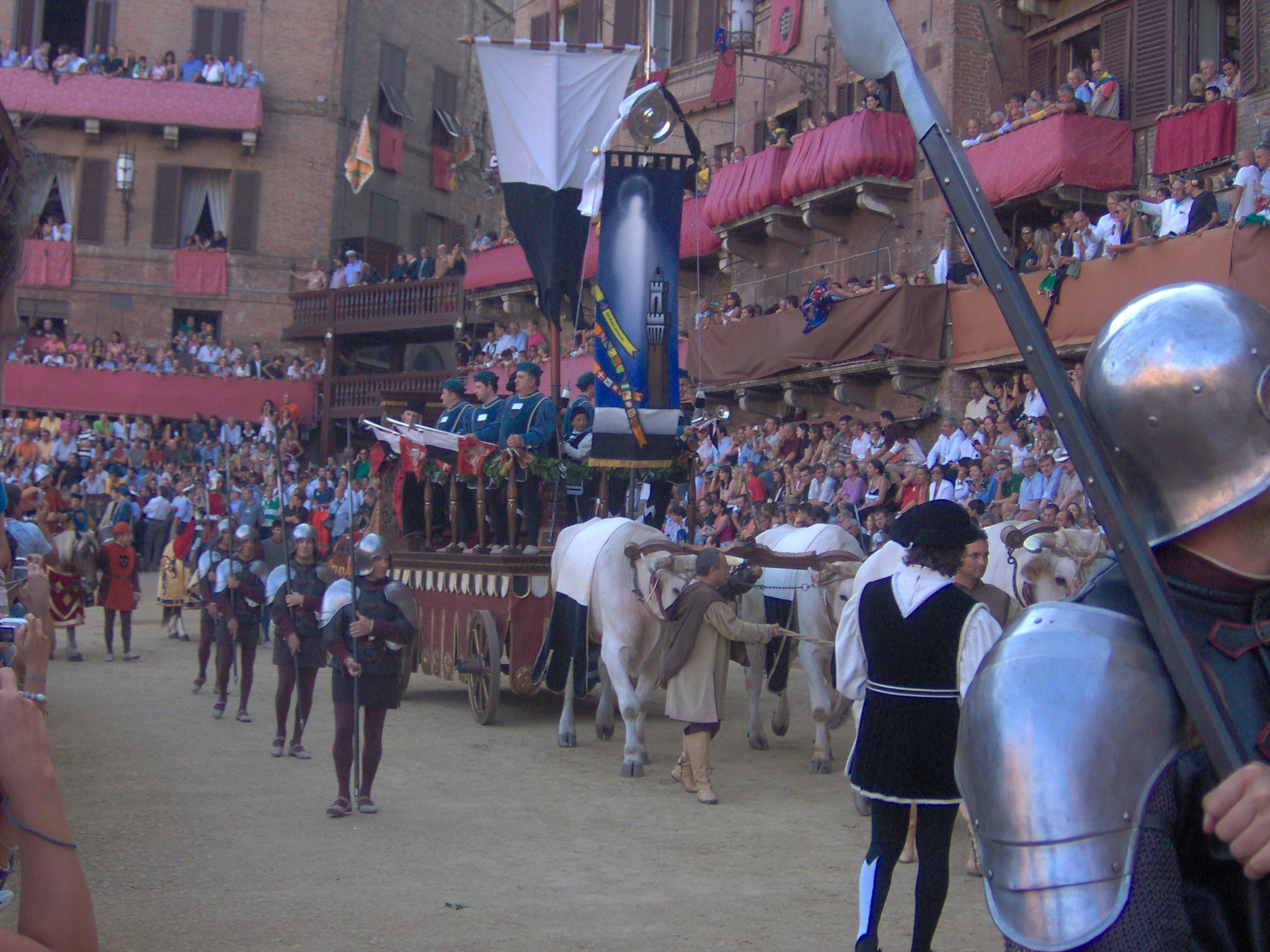 Image Palio dell'Assunta (16/08/2006) - Siena